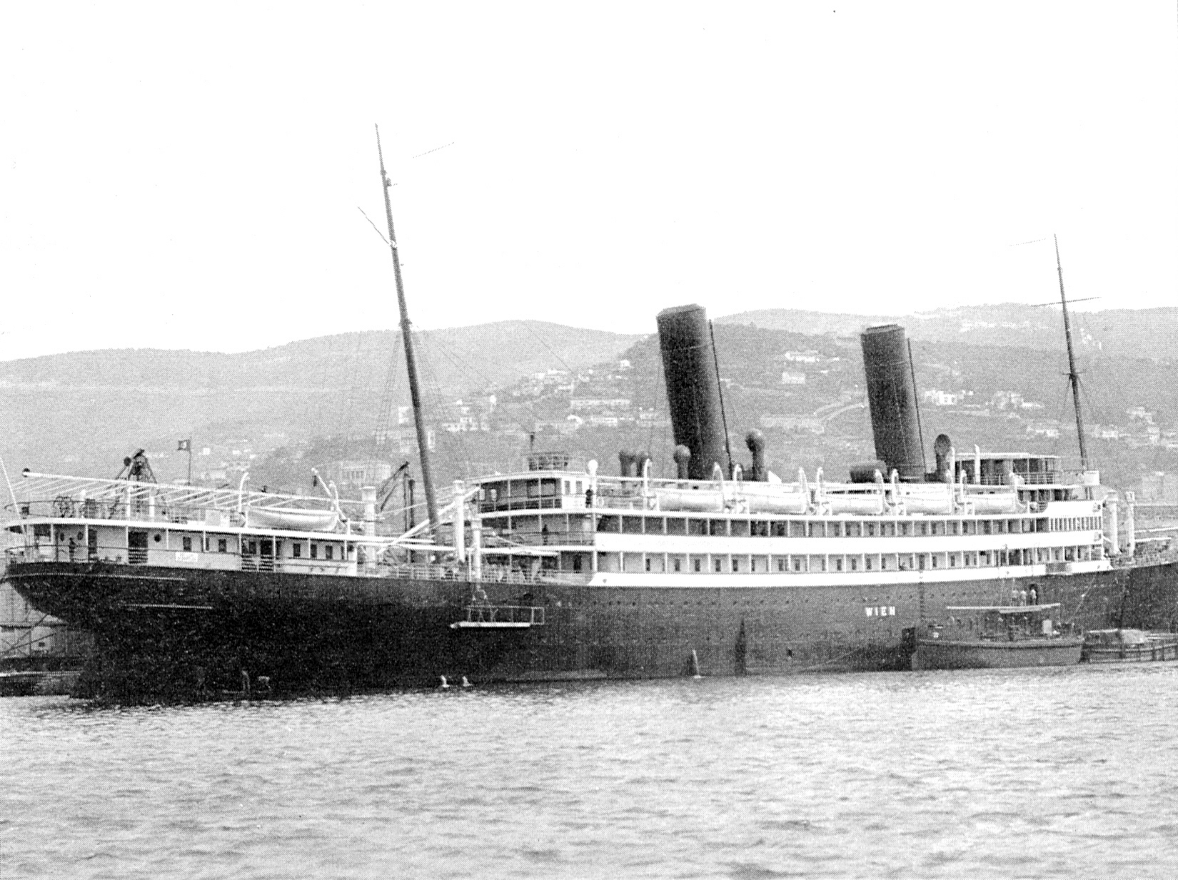 Dampfer des Österreichischen Lloyds: Wien (7.367 t); 1911 im Lloydarsenal vom Stapel gelaufen.